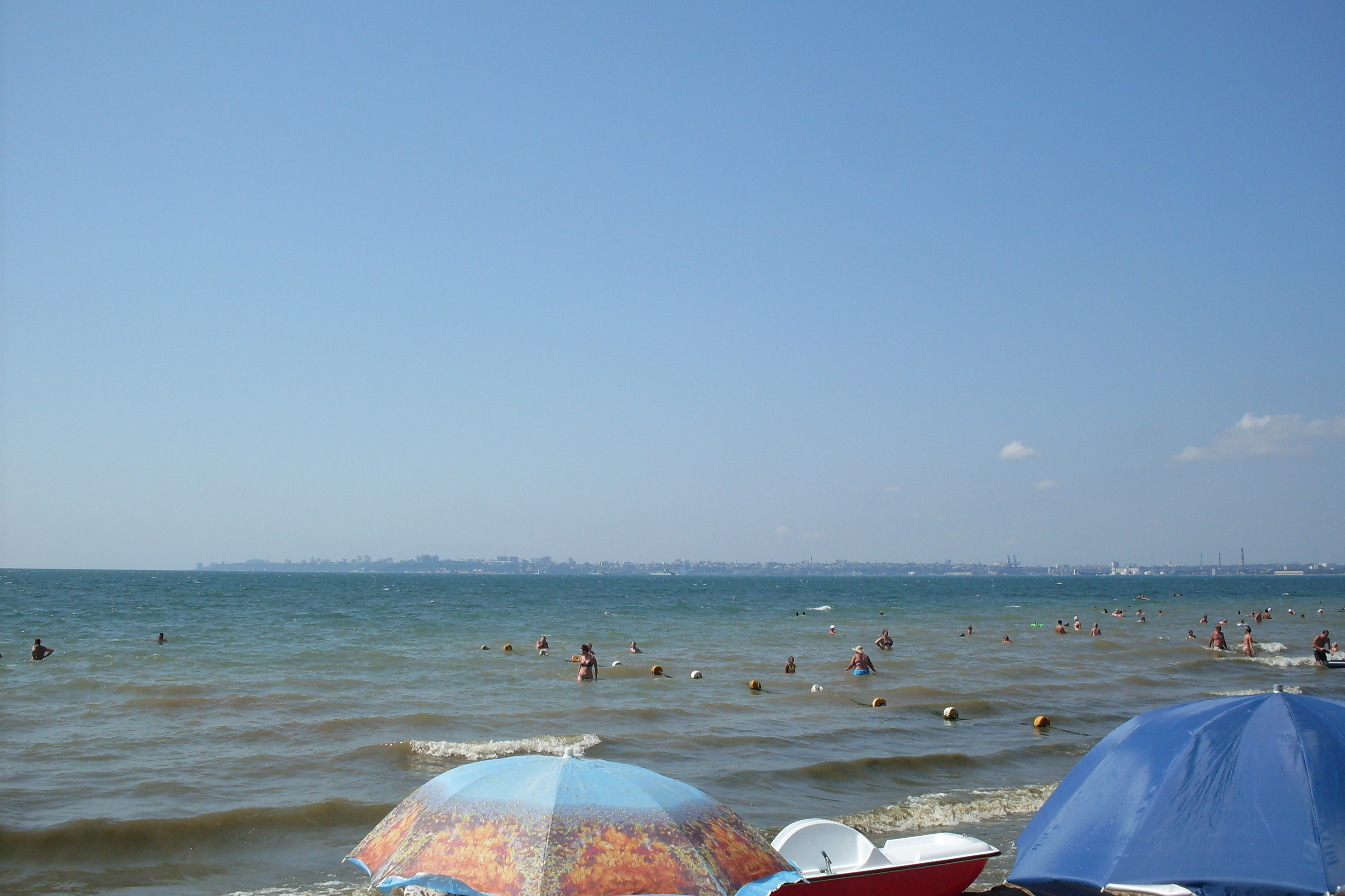 Kryzhanivka, Odessa Oblast, Ukraine